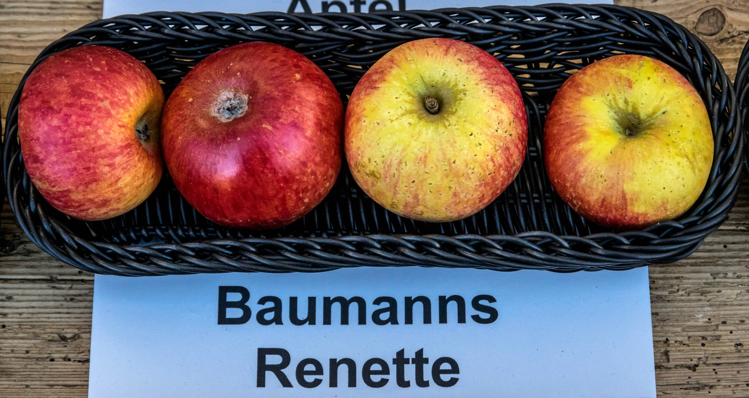 Alte Apfelsorten, von denen es im Badischen noch tragende Bäume gibt. Alle Aufnahmen au dem Oktober 2015